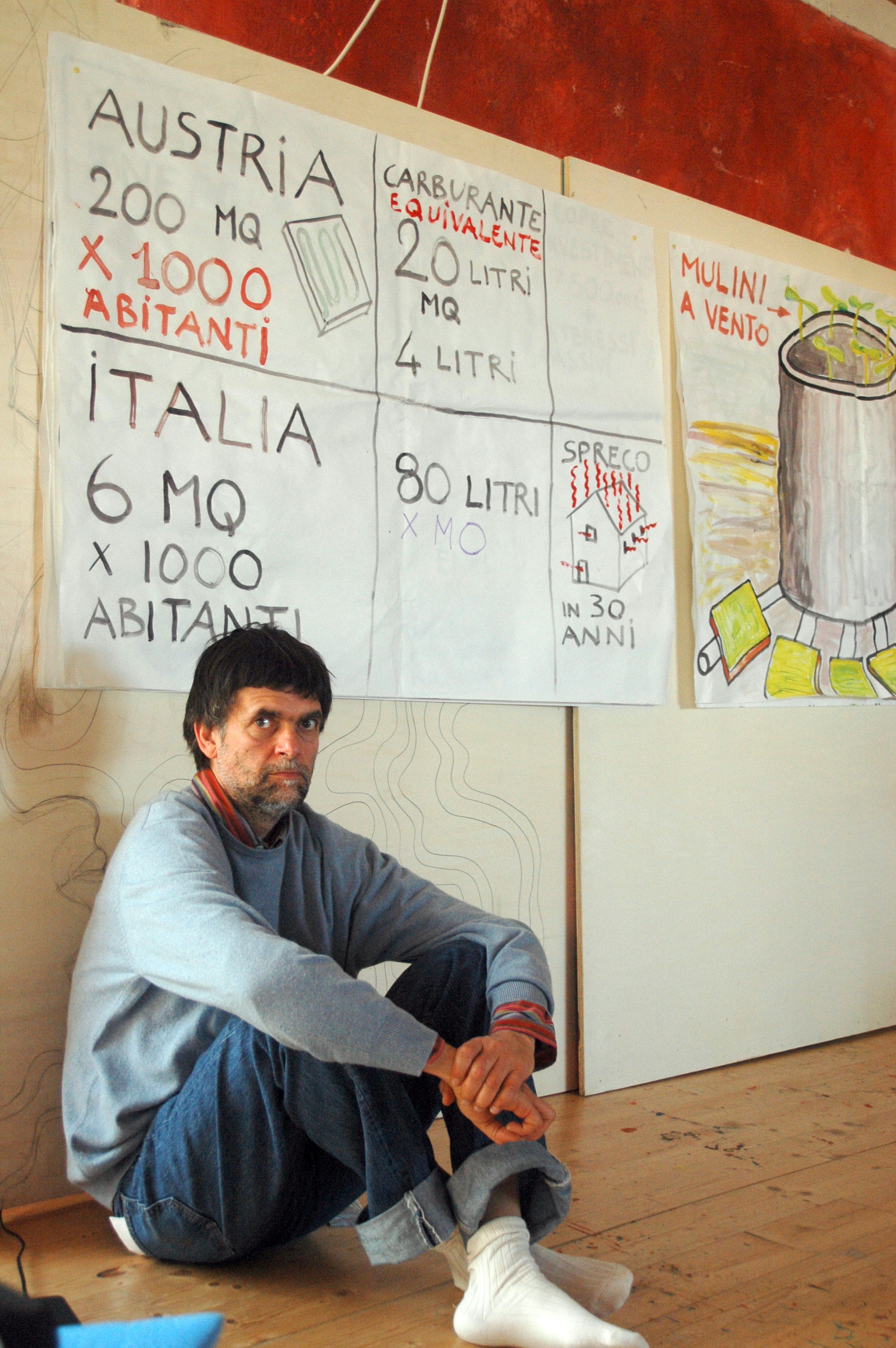 Lo scrittore Jacopo Fo alla Libera Università di Alcatraz presso Gubbio